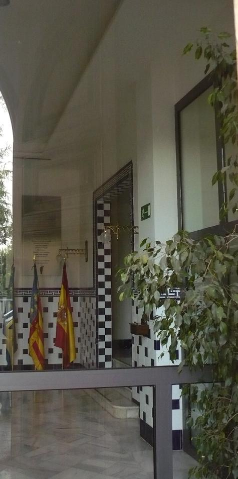 Casa de la Caridad de Valencia, centenaria asociación benéfica.